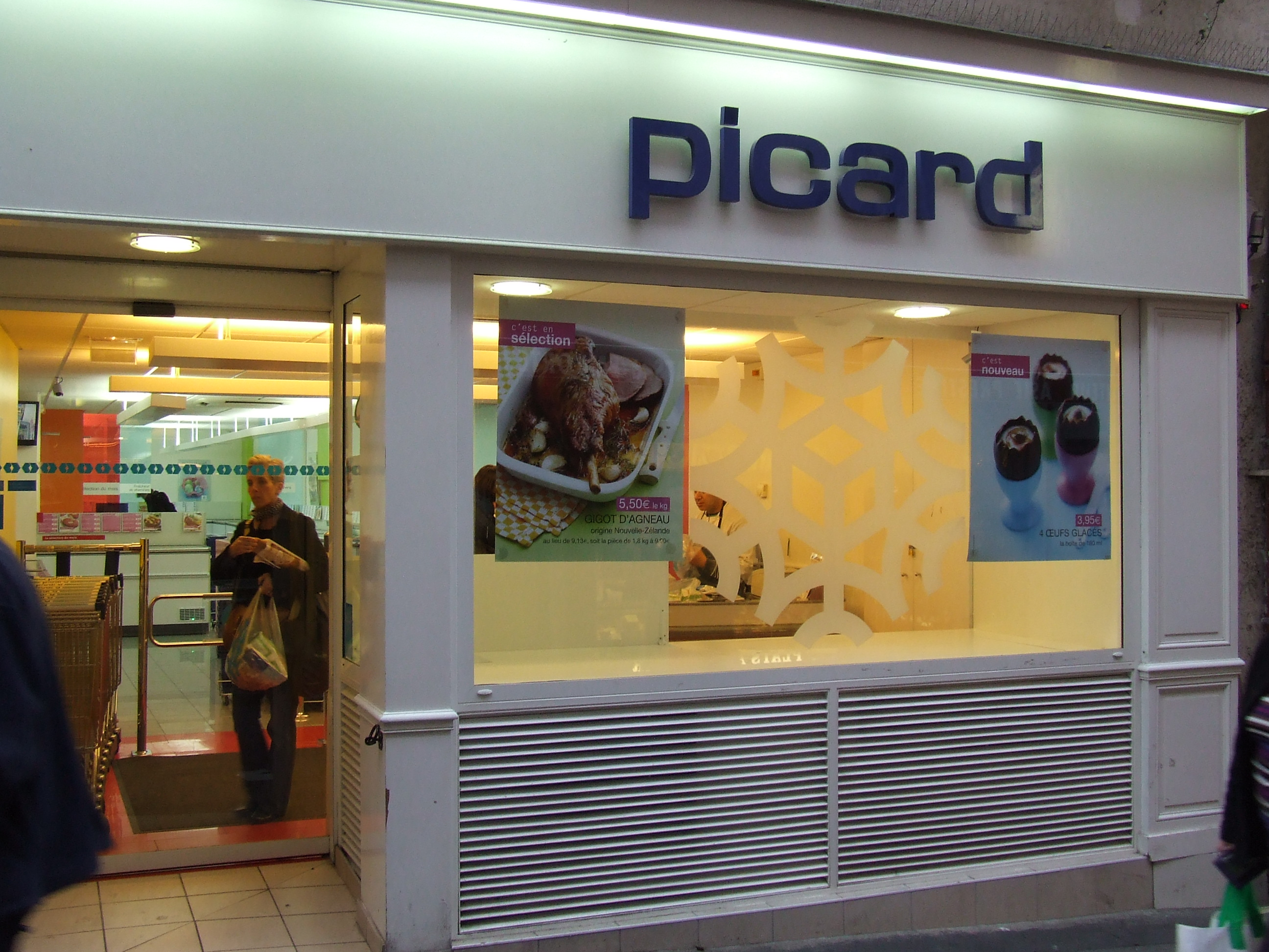 Un magasin Picard, rue Mouffetard à Paris